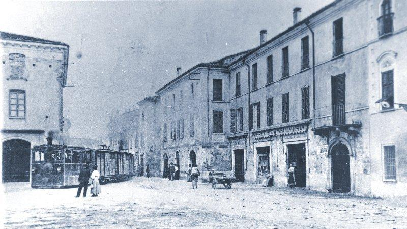 Arrivo del tram a Medole , sulla Tranvia Brescia-Mantova-Ostiglia in una foto di fine XIX secolo.